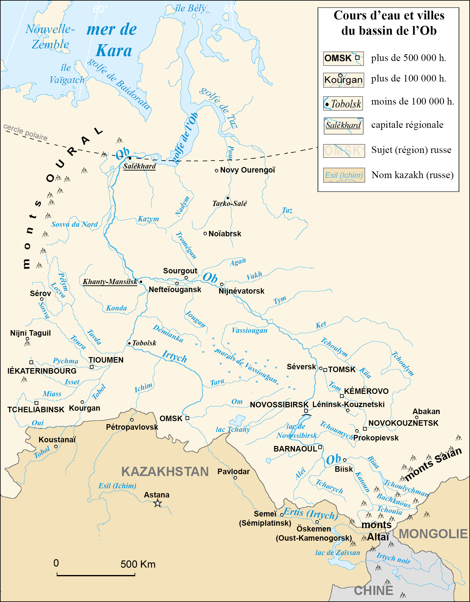 Bassin de l'Ob (sans régions), russie